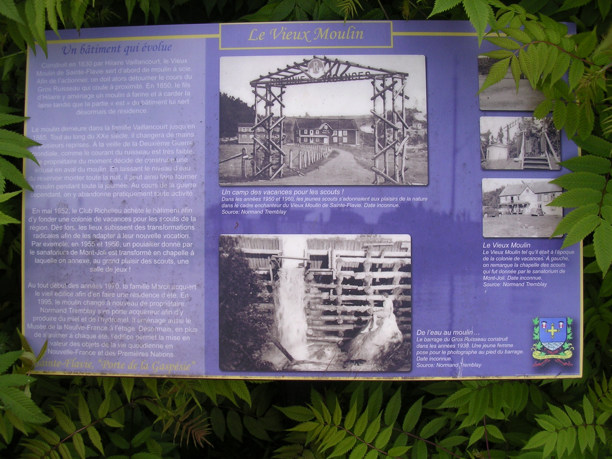 Panneau d'interprétation du Vieux moulin de Sainte-Flavie (Bas-Saint-Laurent, Québec). Le moulin est maintenant un lieu de production de miel et d'hydromel. À l'étage se trouve le Musée de la Neufve-France. Moulin à eau; moulin à farine; abeilles; ruches; Nouvelle-France.